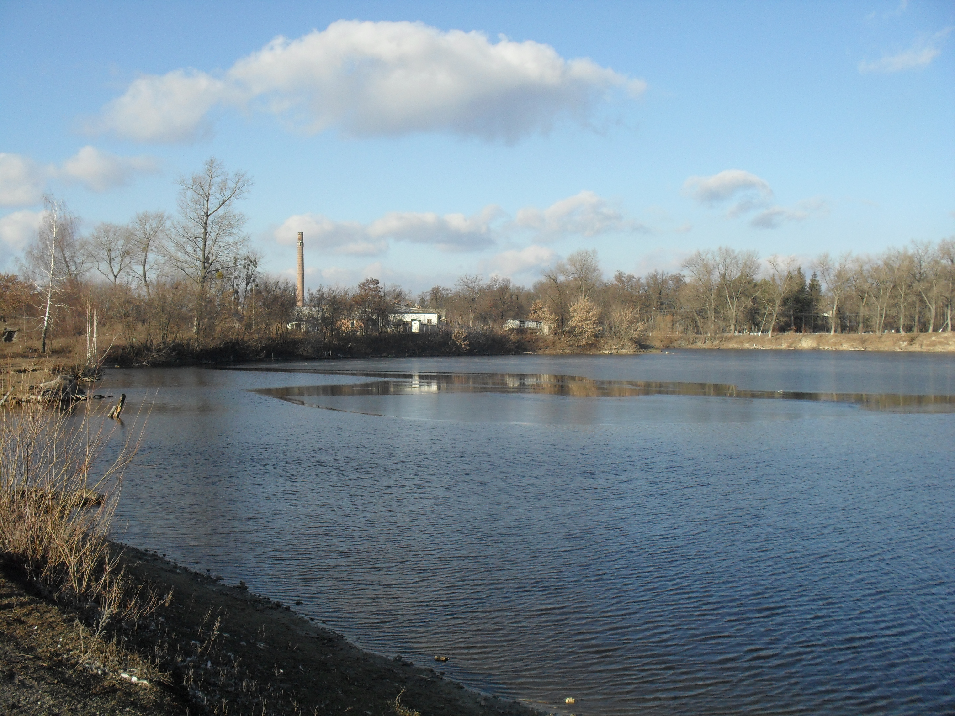 кар'єр між автодорогою та залізницею у Турбові